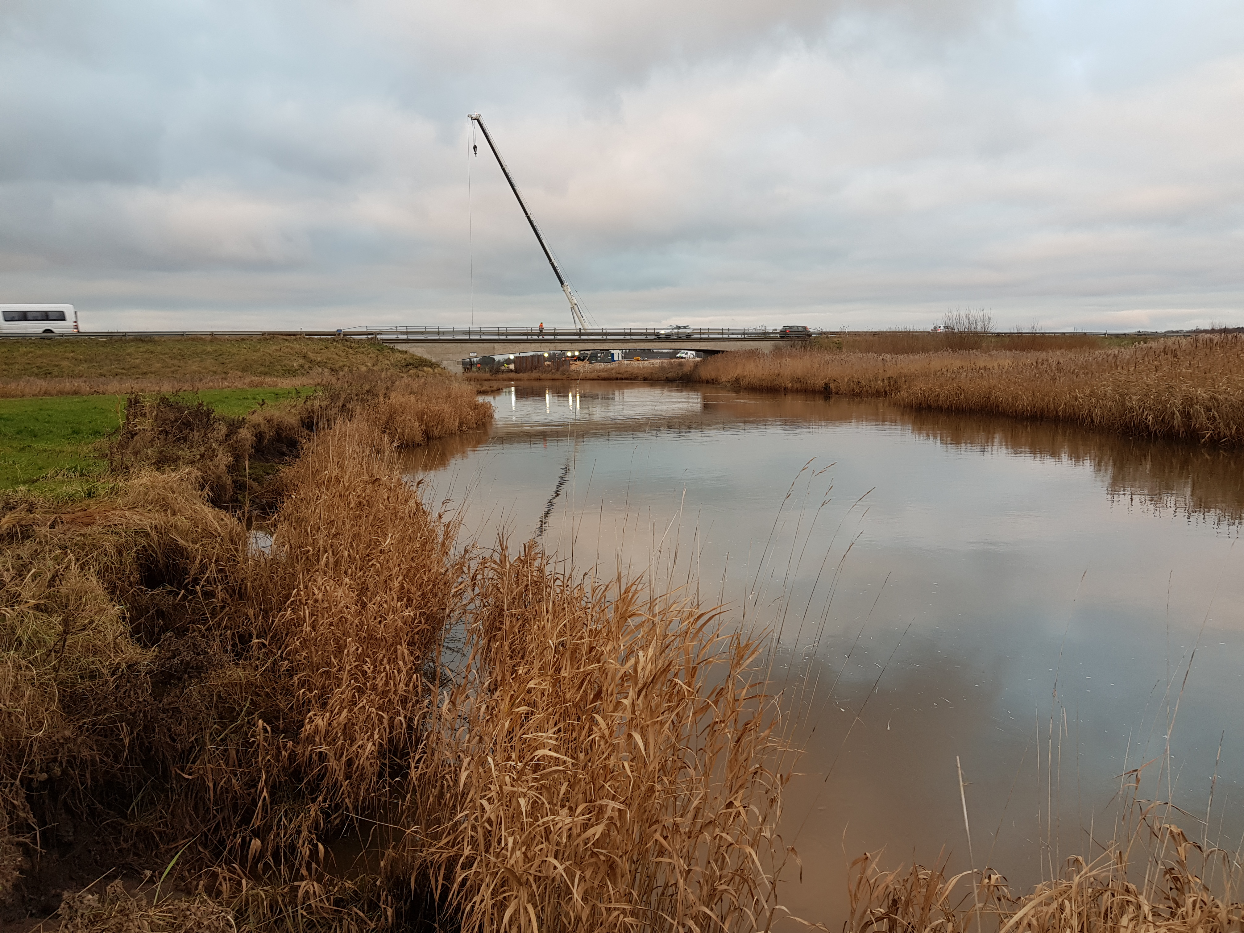 Omfartsvejens bro over Ribe Vesterå. Bag broen ses forberedelserne til den midlertidige bro, der skal benyttes, mens omfartsvejen ombygges.